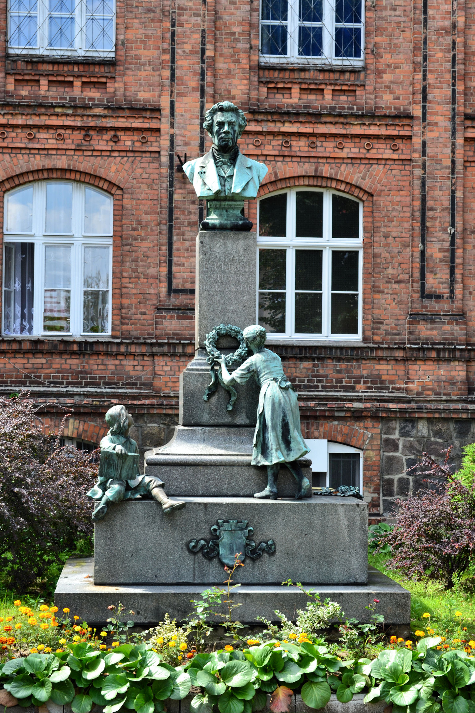 Moryń